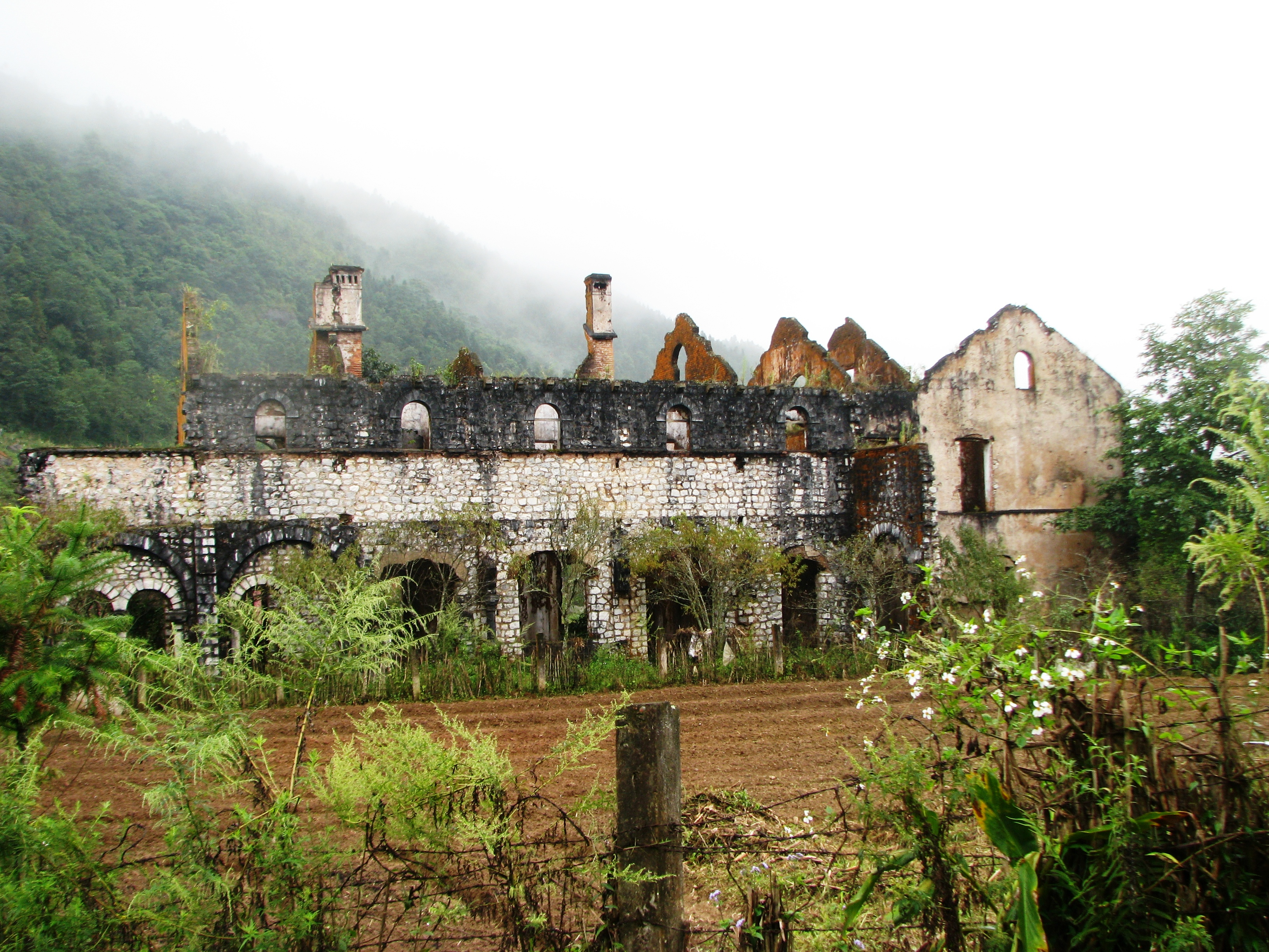 Phế tích của Tu viện Tả Phìn được thành lập vào cuối năm 1942 bởi các nữ tu theo lối khổ hạnh, thuộc dòng Nữ tu của Hội Thánh Ki tô giáo.